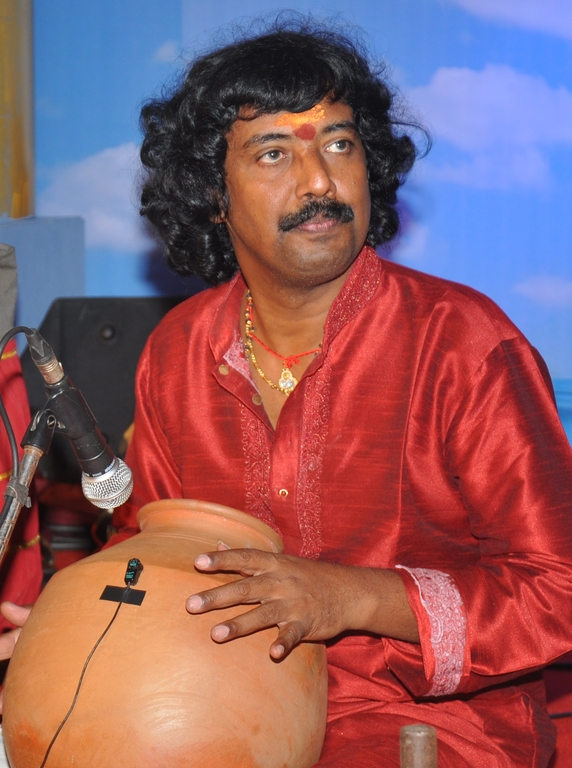 കേരളീയനായ സംഗീതജ്ഞനും ഘടം വാദകനുമാണ് ആദിച്ചനല്ലൂർ അനിൽകുമാർ. കേരള സംഗീത നാടക അക്കാദമിയുടെ കലാശ്രീ പുരസ്കാരം ലഭിച്ചിട്ടുണ്ട്.